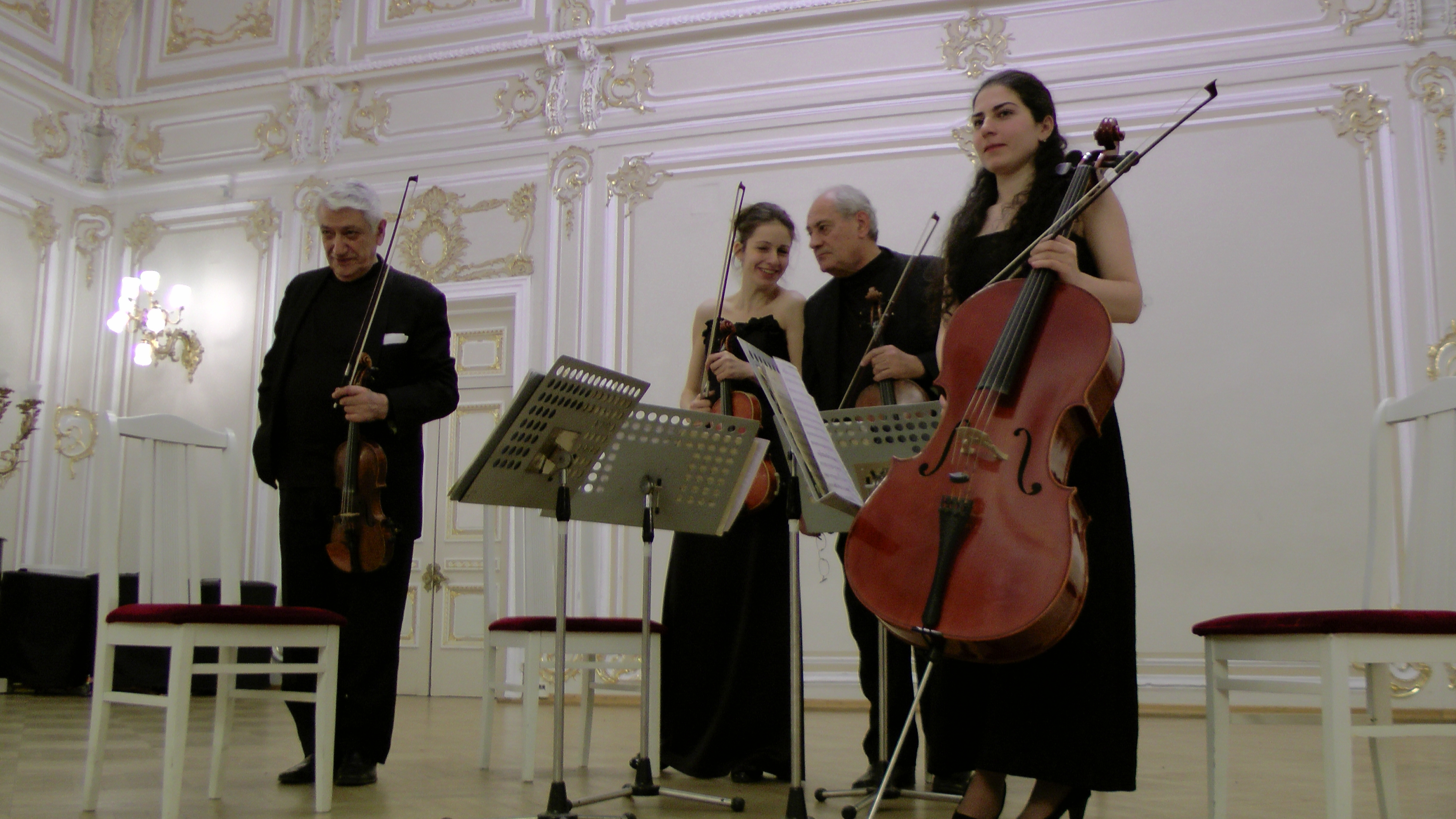 Квартет имени Комитаса на праздновании 90-летия в МЗ филармонии Санкт-Петербурга. 27.11.2014